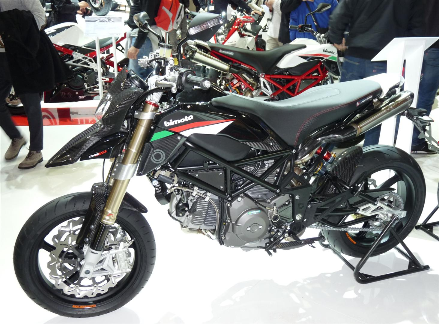 Bimota DB10 B.Motard sur le stand Bimota lors de l'EICMA 2012